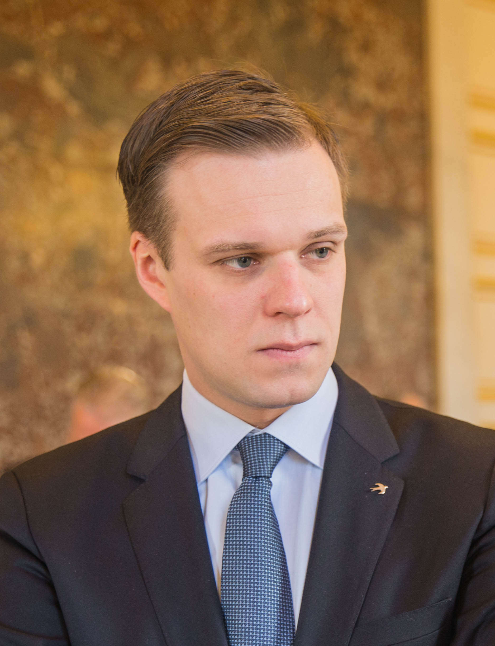 EPP Summit, Brussels, December 2016